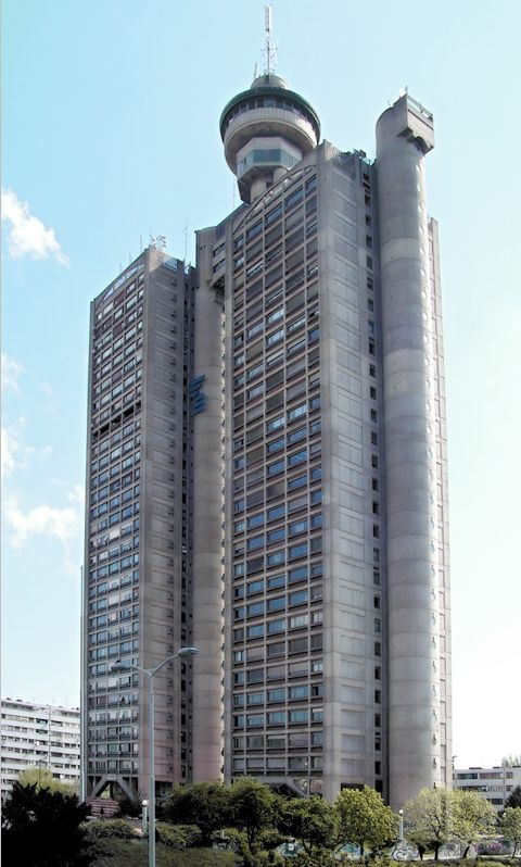 Genex Tower in Belgrade